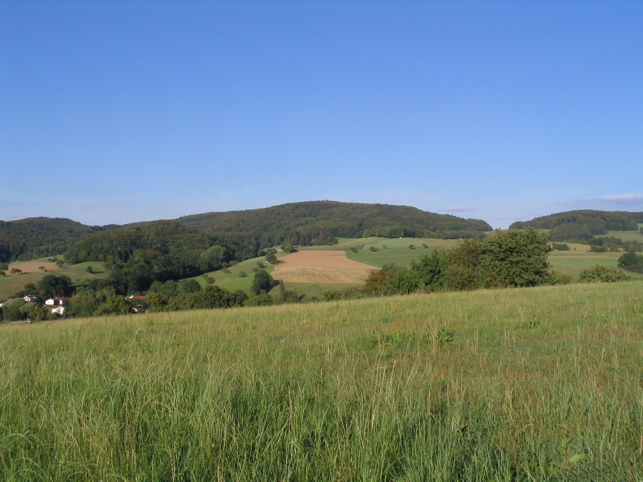 Blick von Südwesten zur Neunkircher Höhe, der mit 605 m höchsten Erhebung im hessischen Teil des Odenwaldes